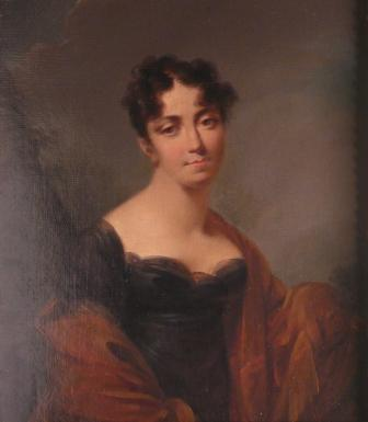 Anasthasie Émilie Guignard de Saint-Priest, fille du diplomate et homme d'Etat français François-Emmanuel Guignard de Saint-Priest (1735-1821). Elle épousa Ange Jean Michel Bonaventure, marquis de Dax d'Axat (1767-1847).